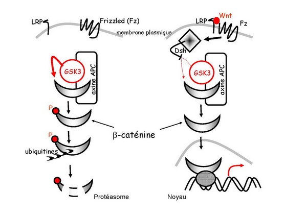 Voie de signalisation canonique des protéines Wnt (d'après Yves Combarnous (2004) Communications et Signalisations Cellulaires. Editions Lavoisier Tec&Doc